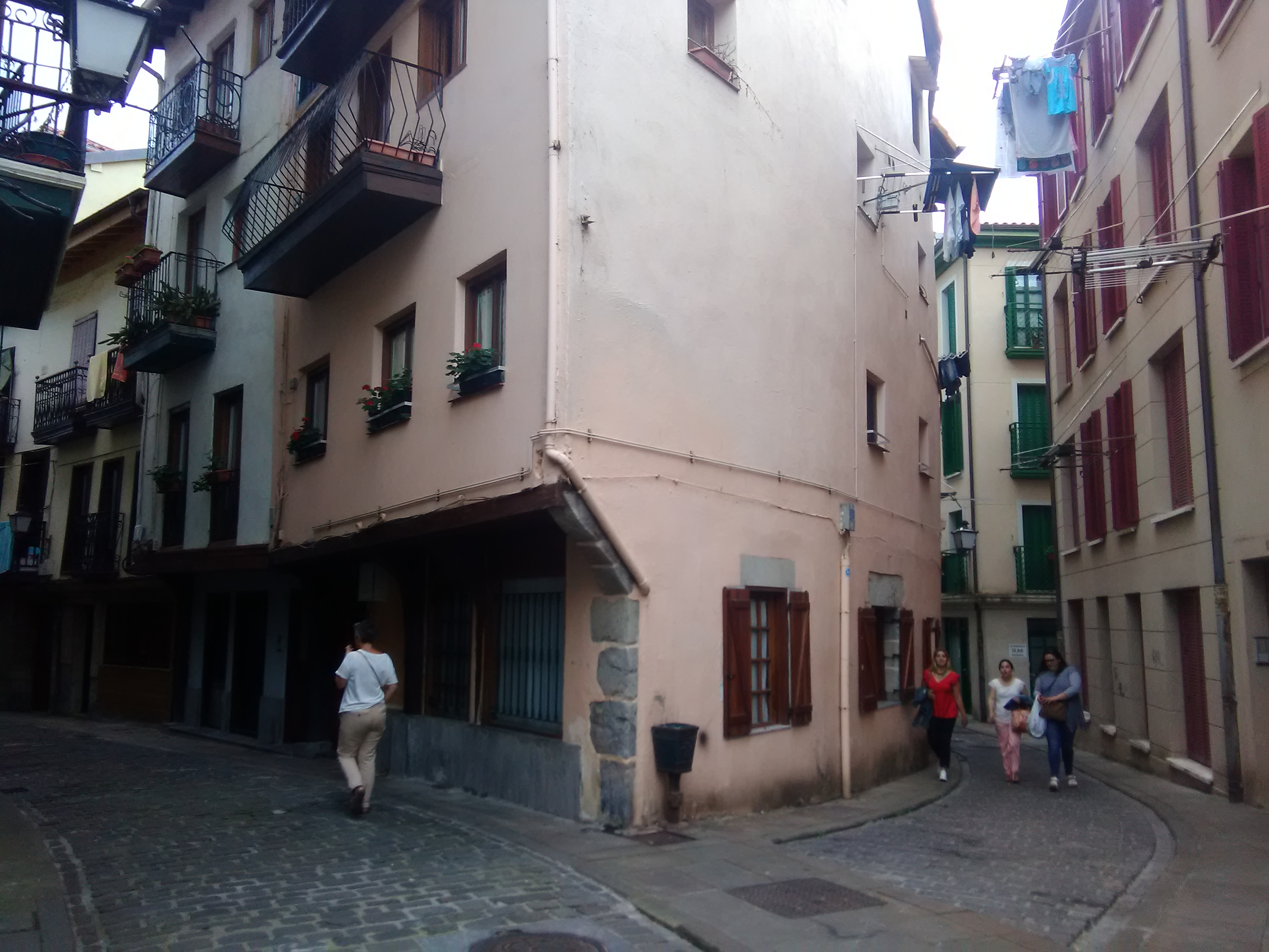 Casa nº 16 de Beaskokalea (Lekeitio, Vizcaya, España). Adquirida por el "americano" Antonio Onaindia "Tony Bronco" o "Amoto Bronko", y pintada por Diego Rivera ("La Casona", 1907).